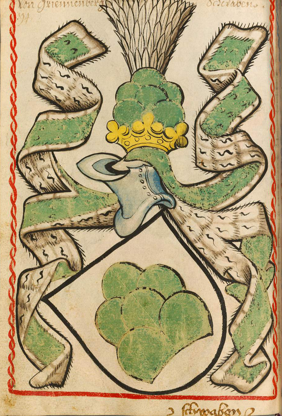 Scheibler'sches Wappenbuch, älterer Teil; Seite 194 Von Griennenberg Schwaben